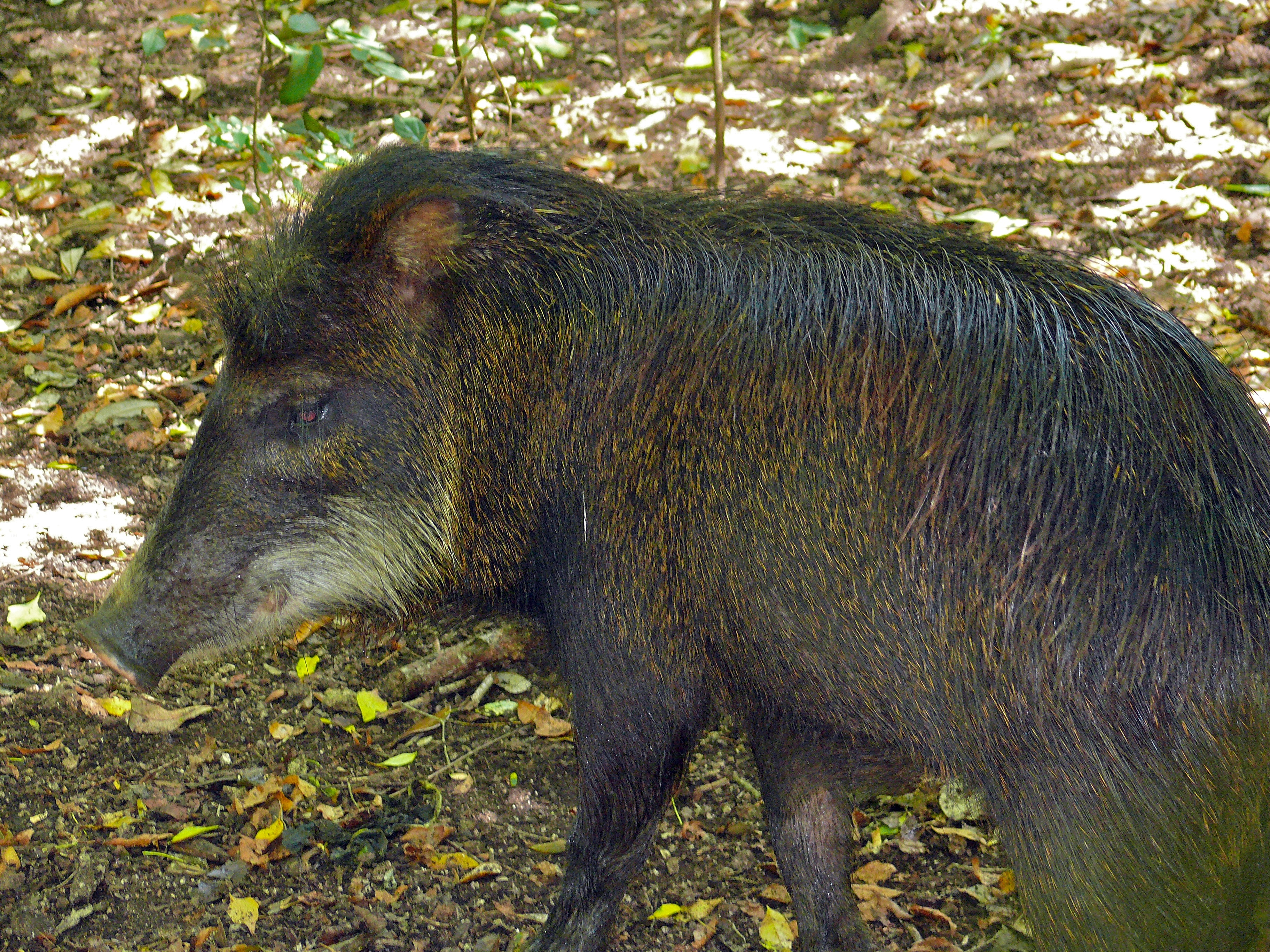 Petencito Zoo Santa Elena